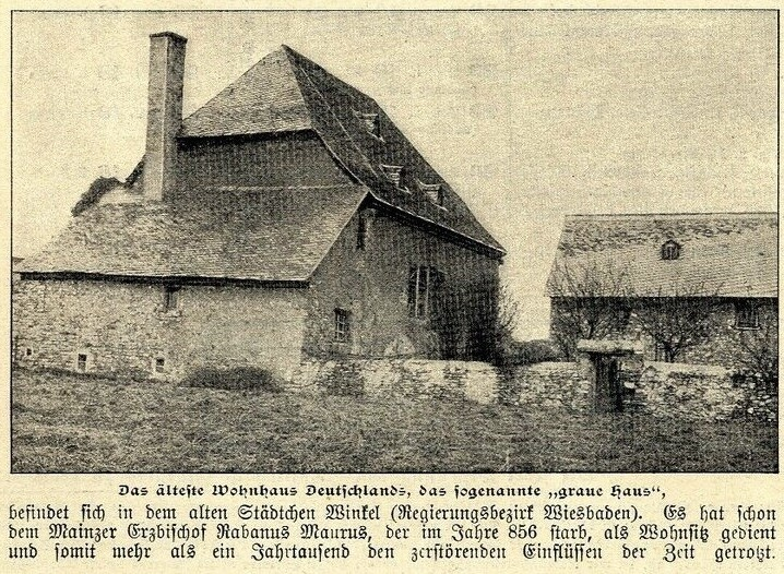 Das sogenannte Graue Haus in Winkel, 1911